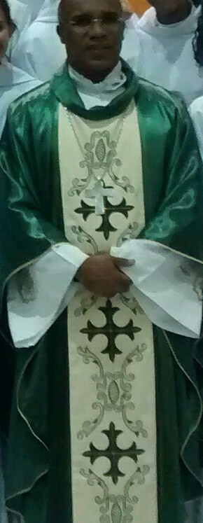 Bispo Diocesano da campanha.